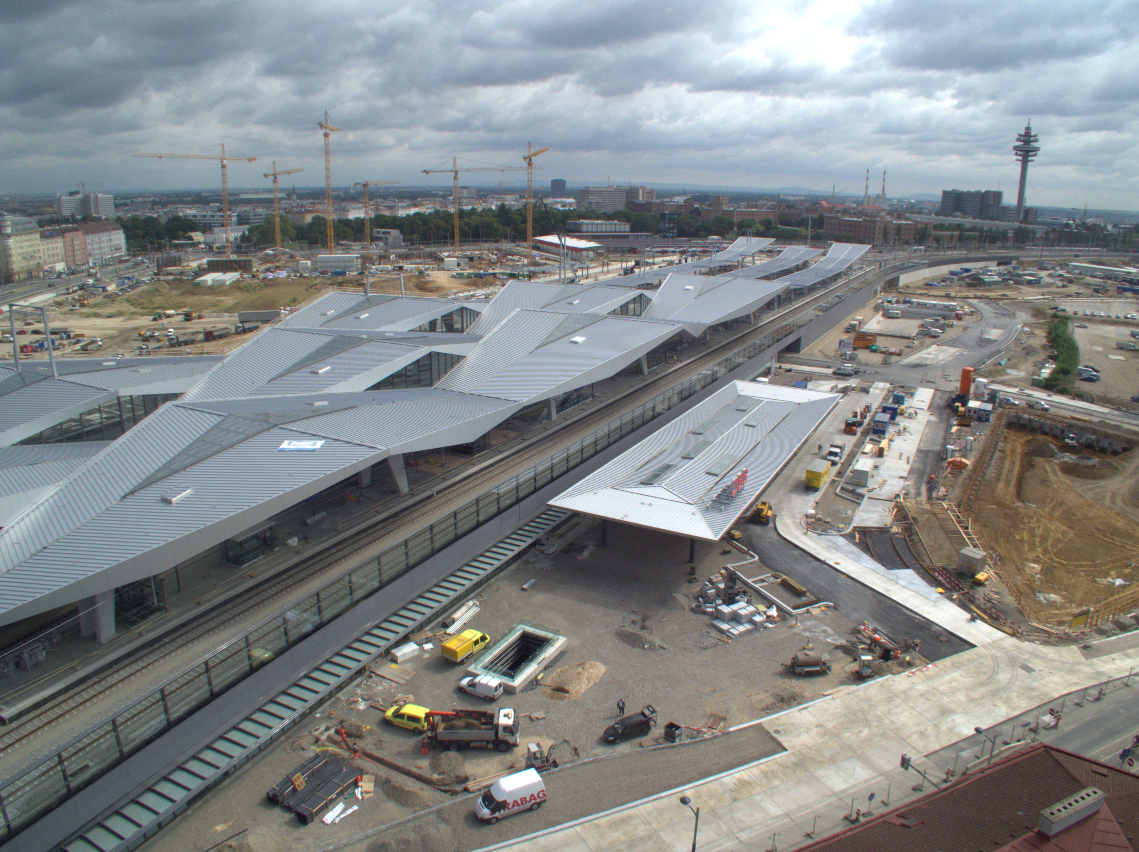 Blick vom Wiener Bahnorama-Turm